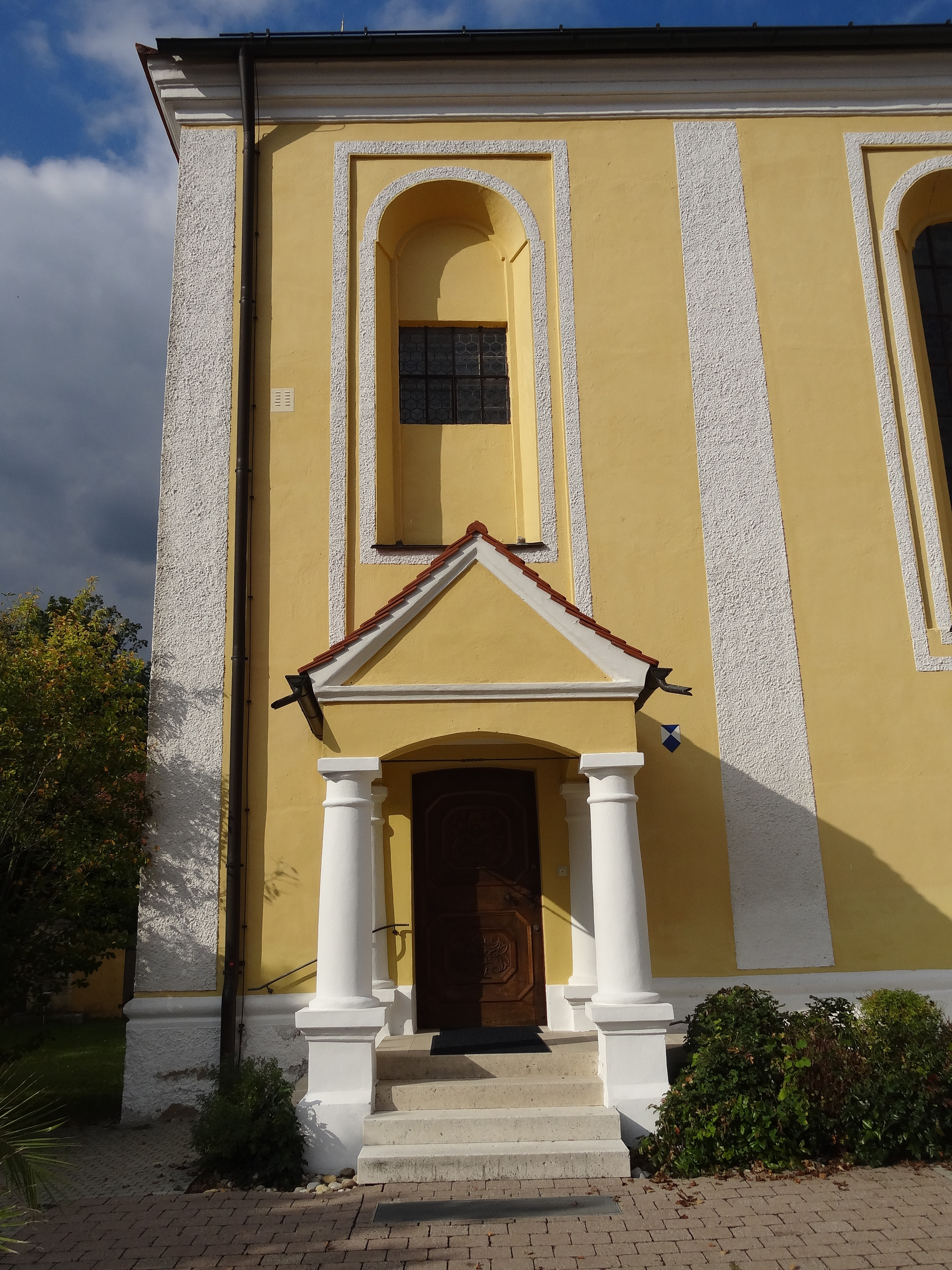 Portal der Pfarrkirche St. Vitus in Offenstetten (Stadt Abensberg, Landkreis Kelheim)